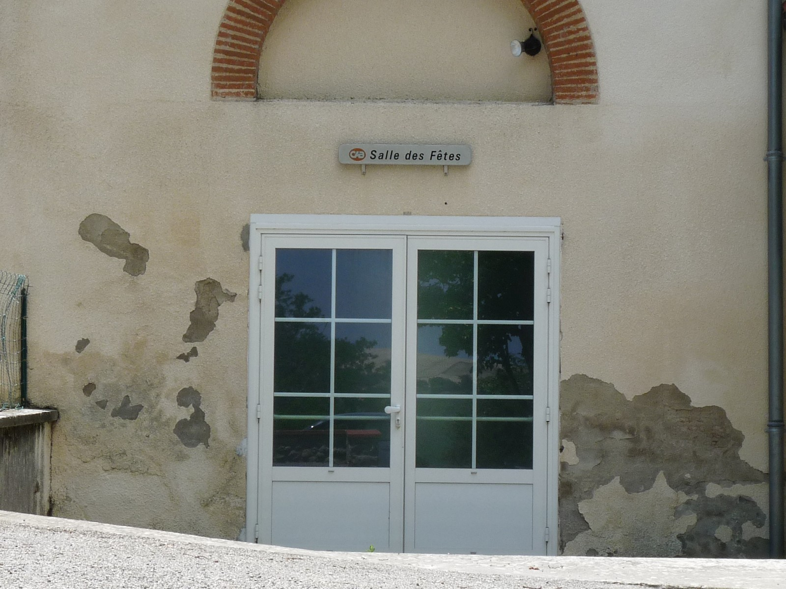 Salle des fêtes, La Salvetat-Lauragais, Haute-Garonne, France